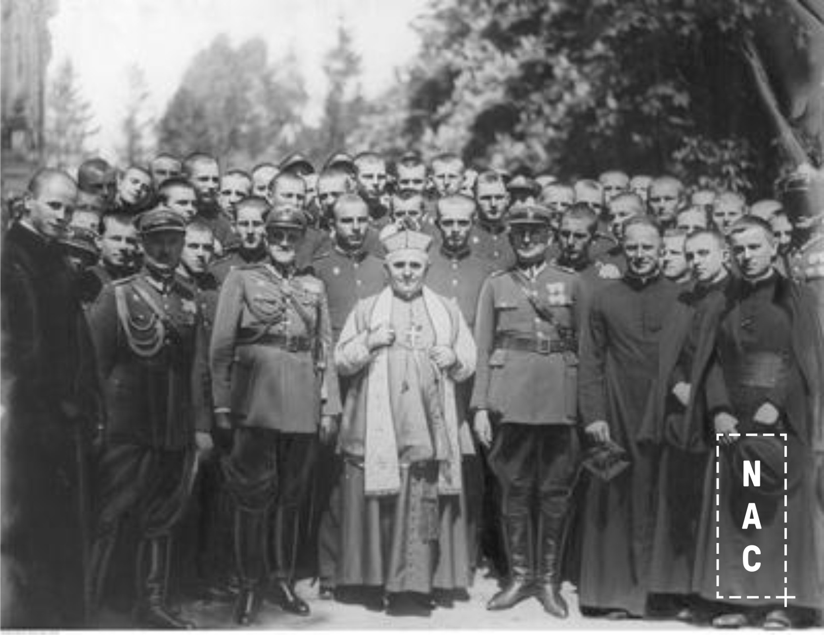 Bierzmowanie w Korpusie Kadetow nr 1 we Lwowie